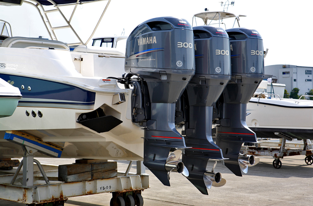 Yamaha Outboard Motors